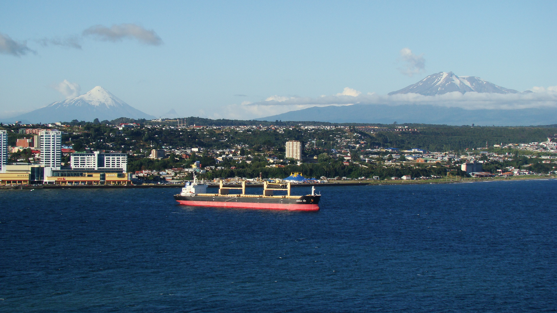 Puerto Montt, Región de Los Lagos, Chile, mirado desde la bahía.